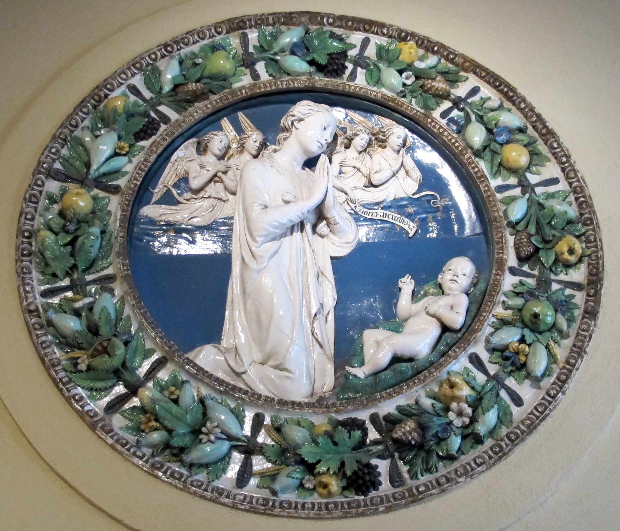 Philadelphia Museum of Art